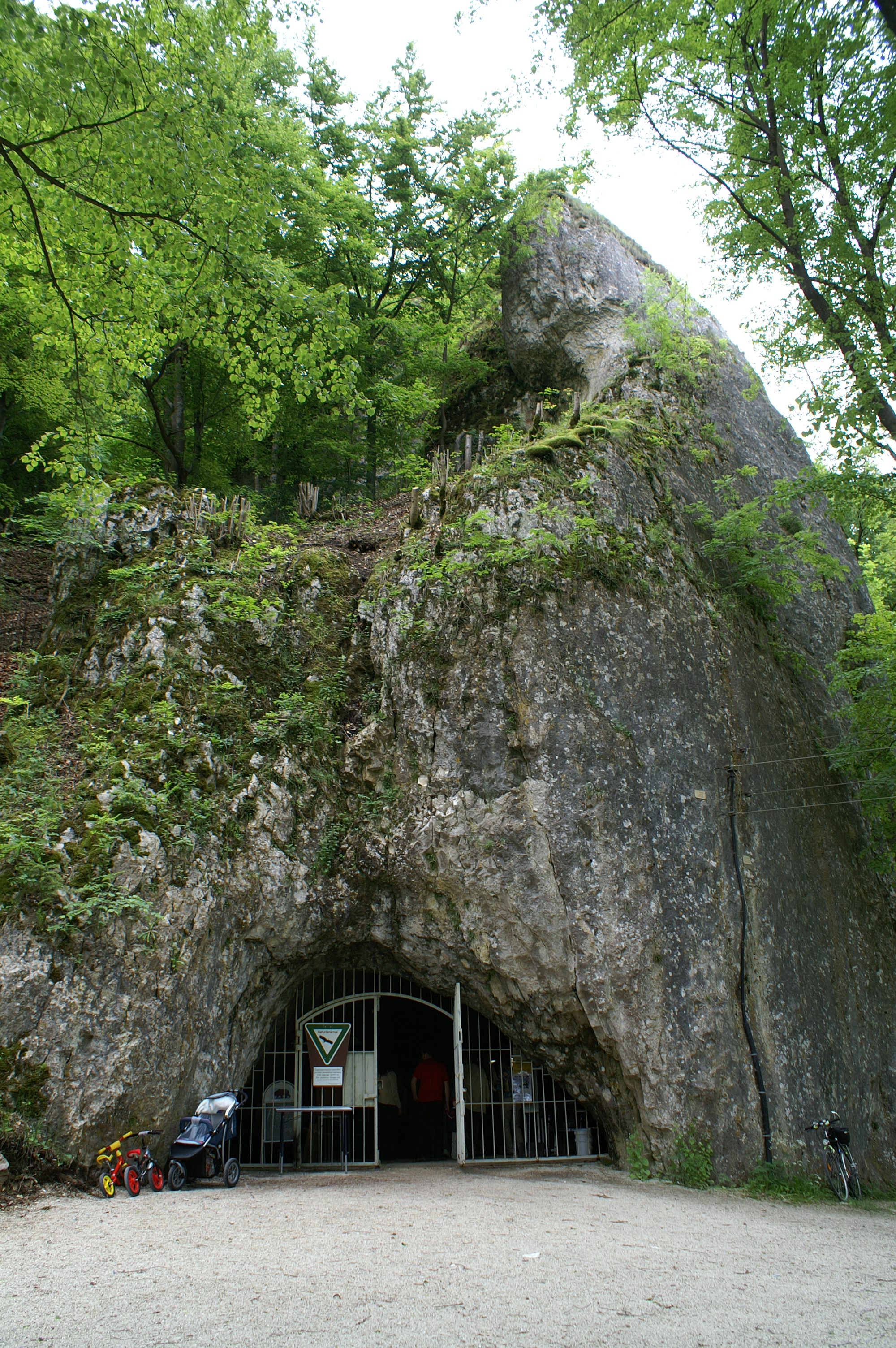 Der Hohle Fels bei Schelklingen im Alb-Donau-Kreis ist ein Schwammstotzen des Weißen Jura. Der zuckerhutförmige Fels liegt im Tal der Urdonau.